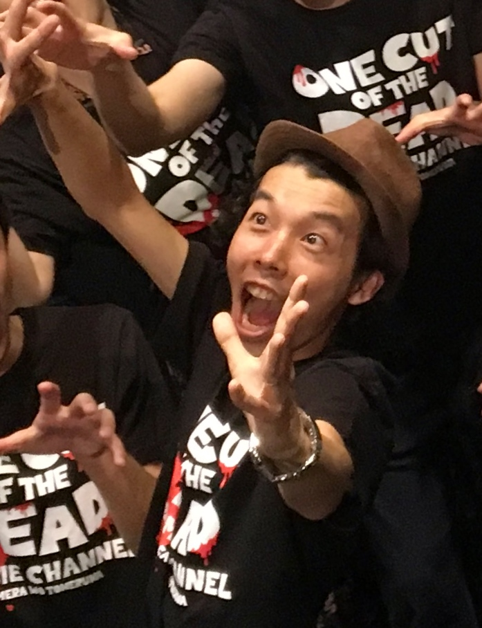 上田慎一郎（2018年7月14日、チネチッタ川崎）